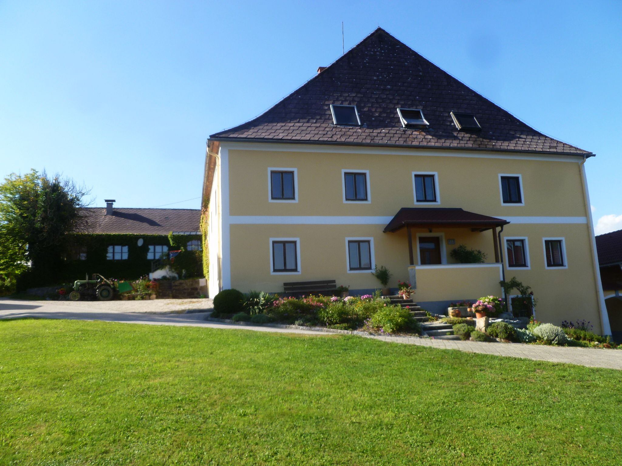 Buchetwies